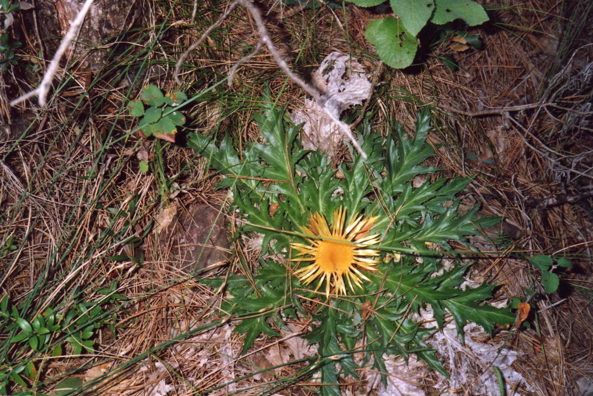 Carlina acanthifolia en el sotobosque de un pinar, Huesca (España). Agosto del 2000.